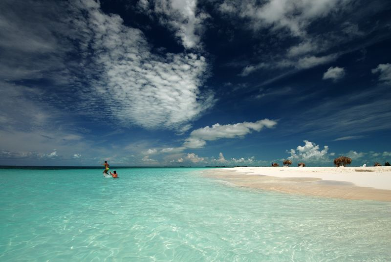 Cayo Largo, augustus 2006, info in de Metadata